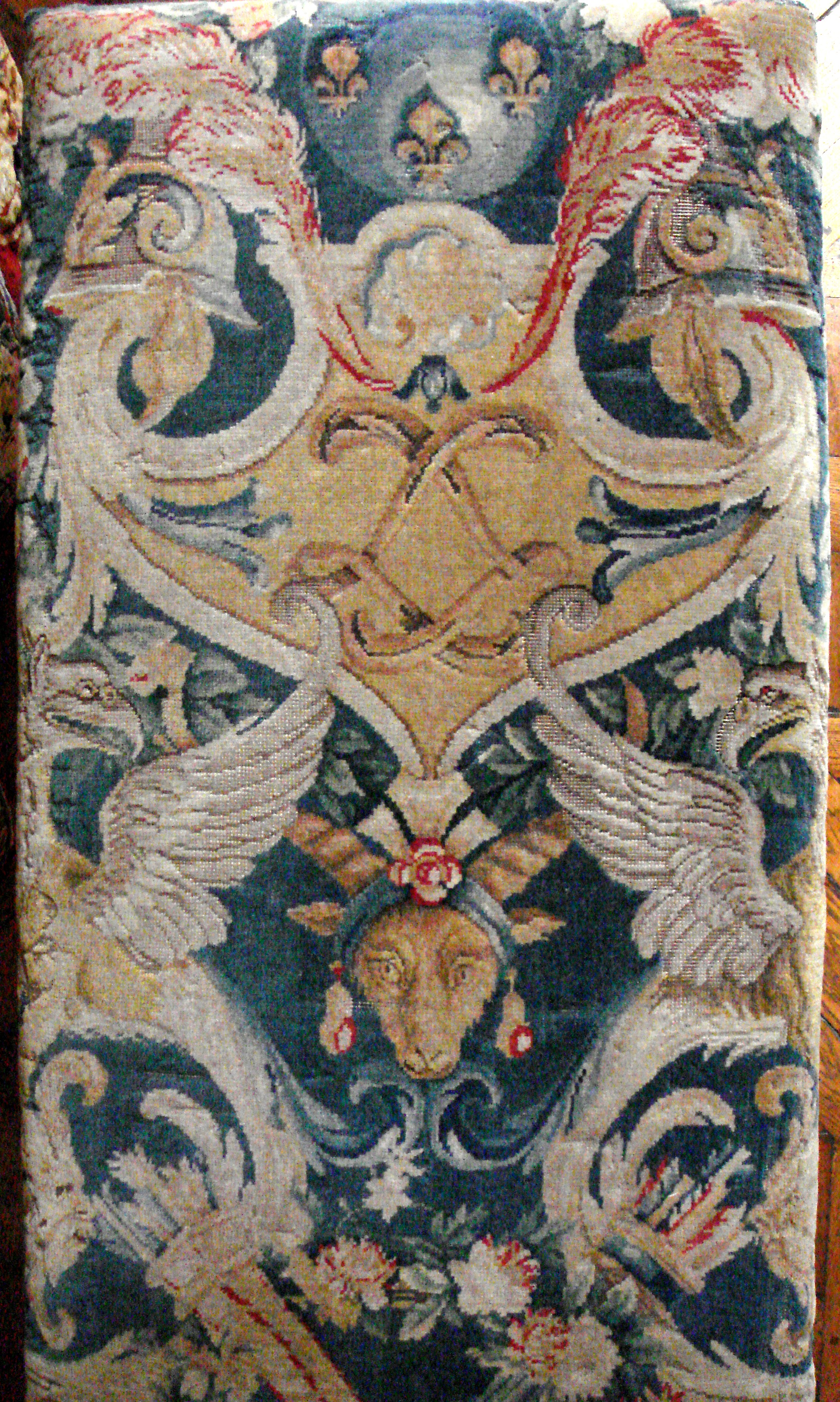 Savonnerie_tapisserie_18th_century_Versailles